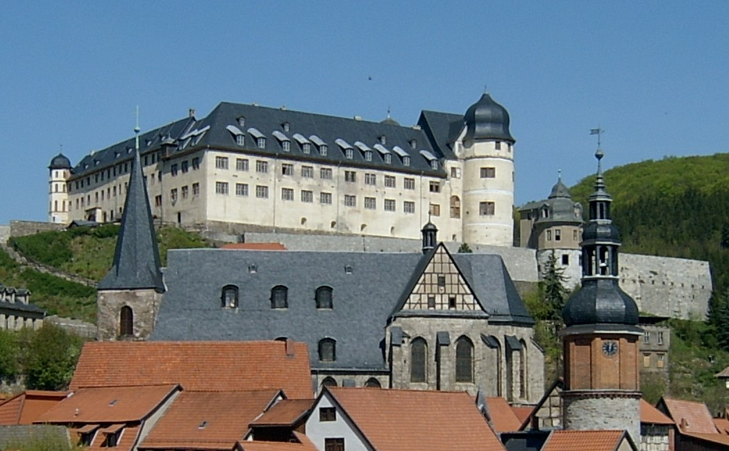 Das Schloß in Stolberg (Harz)